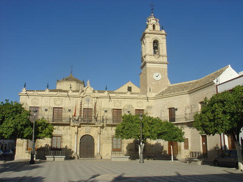 Ayuntamiento de Lora del Río (Sevilla)